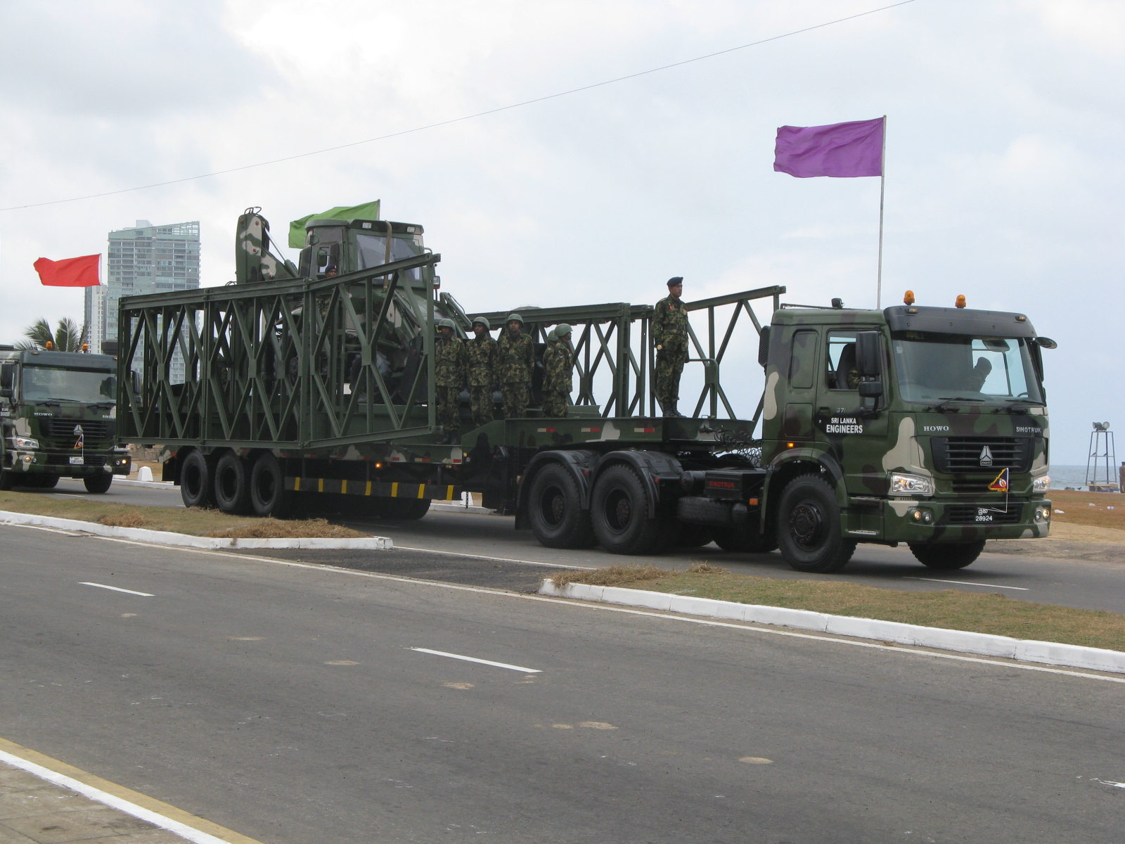 Engineering Unit - Sri Lanka Army